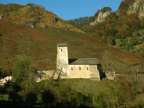 Santa Grazi, eliza erromanikoa, Zuberoa